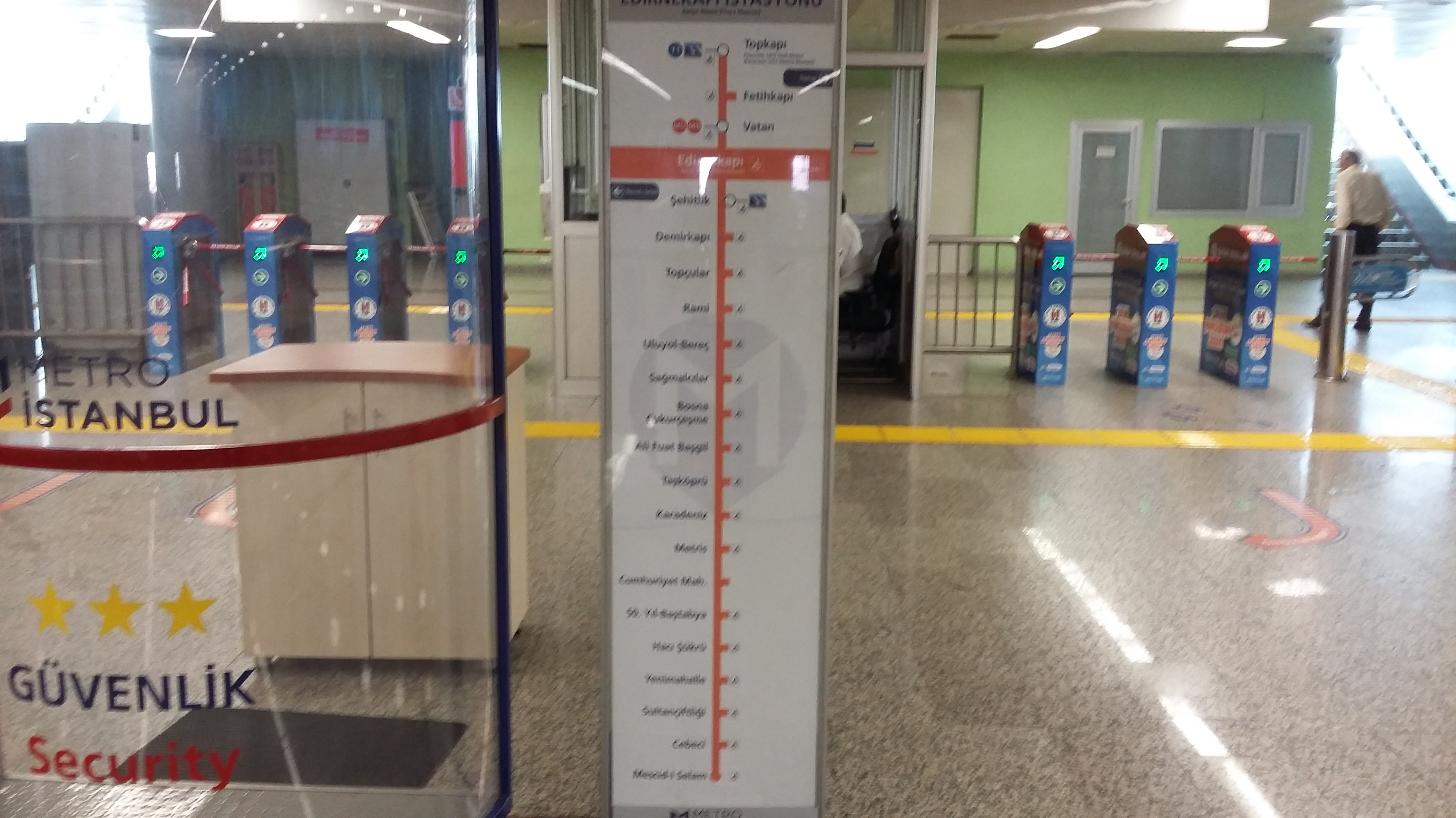 T4 Topkapı - Habibler